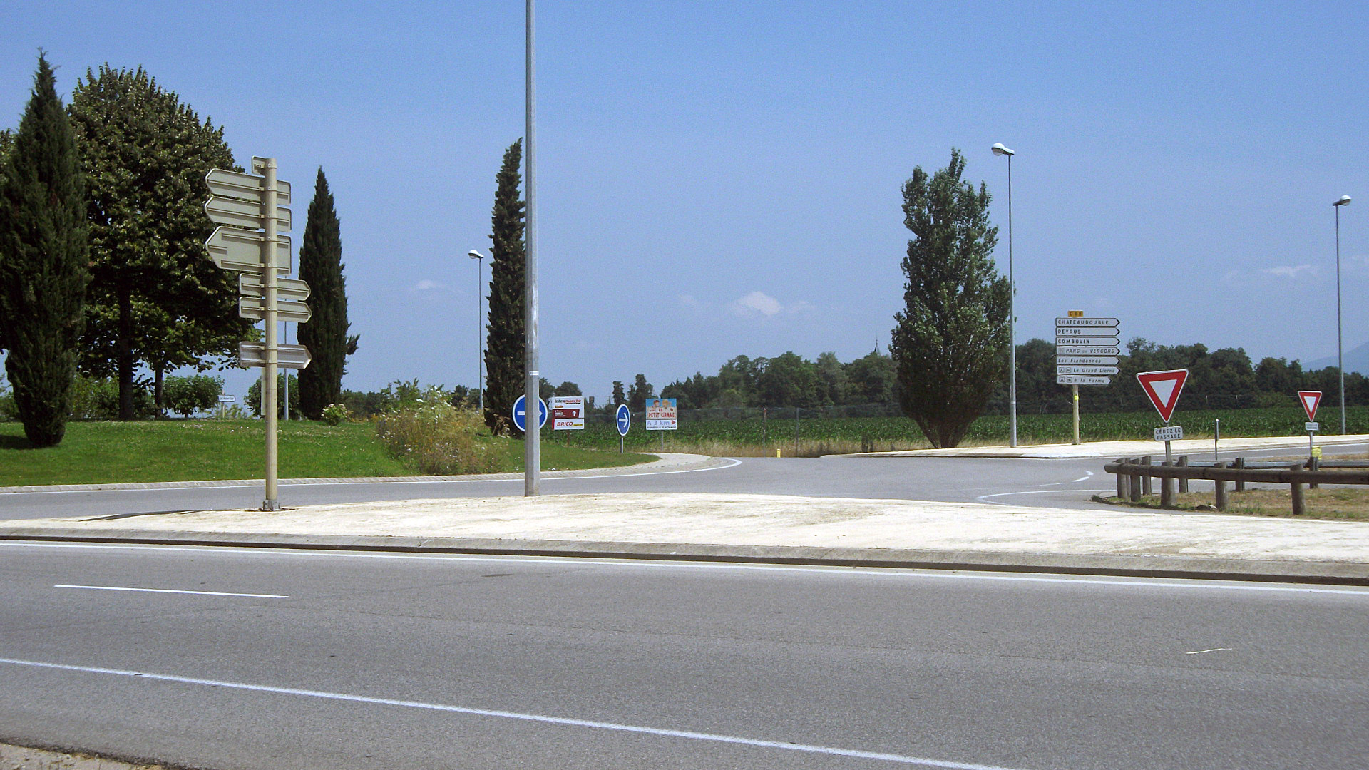 Carrefour giratoire près de Chabeuil, sur la droite, la RD 68 en direction de Châteaudouble.